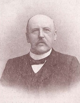 Ludwig Wachler (1835-1908), deutscher Richter und preußischer Generalstaatsanwalt.